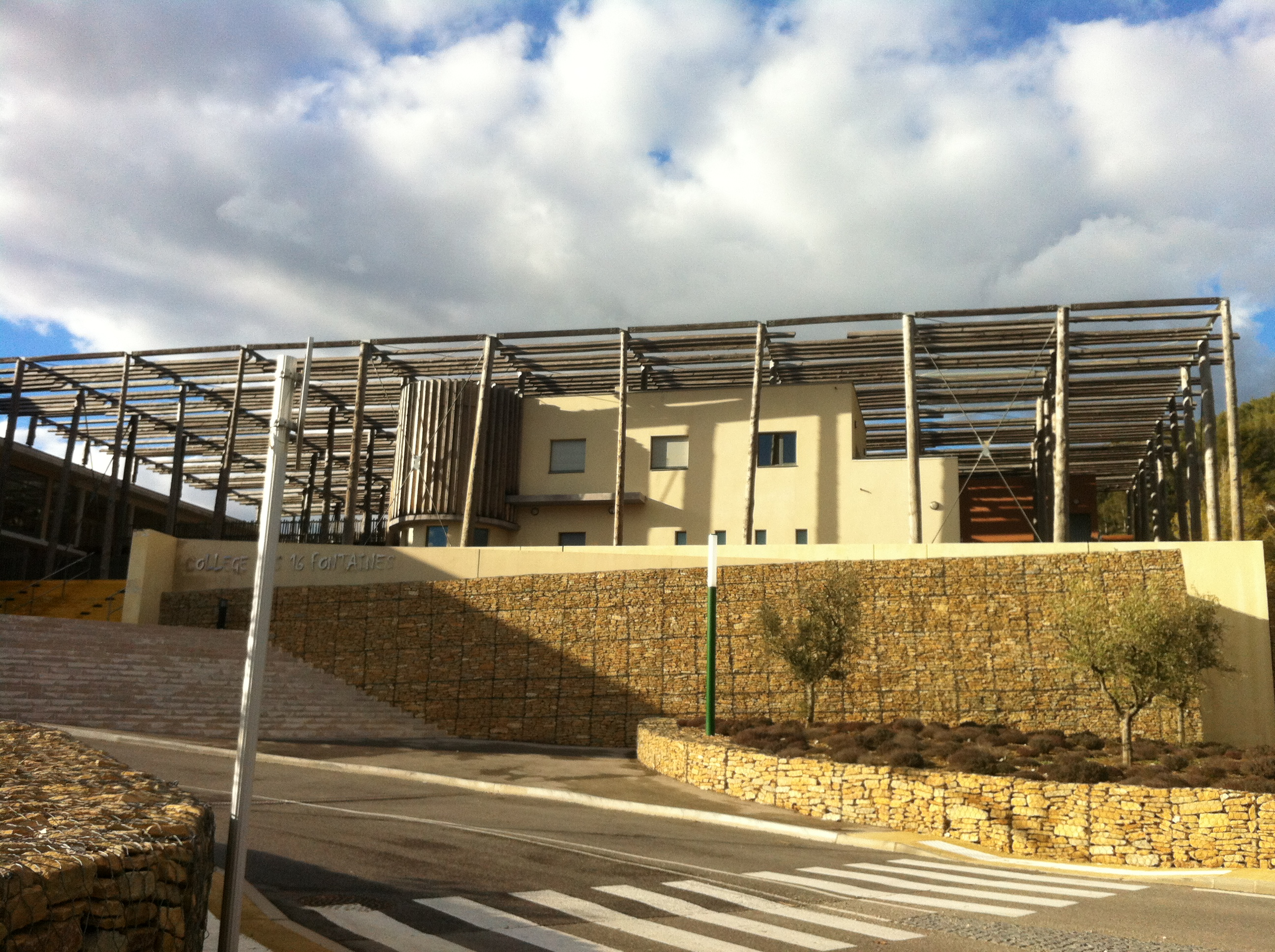 collège